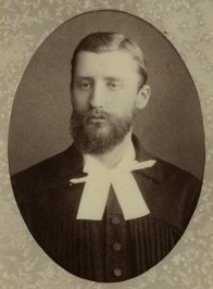 Friedrich Wilhelm Ederberg